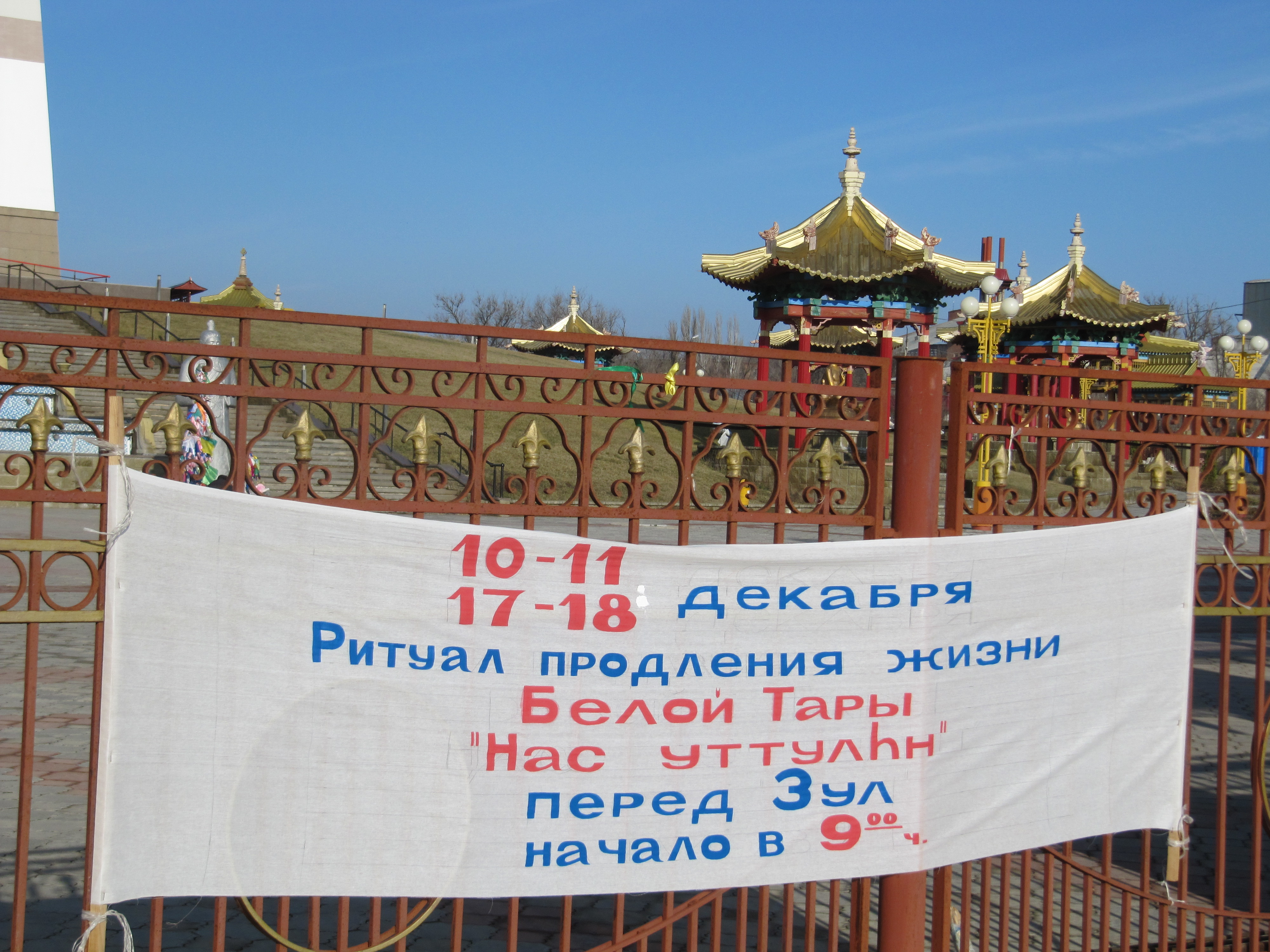 Объявление о буддийском ритуале "Белой Тары" или "Продление жизни"